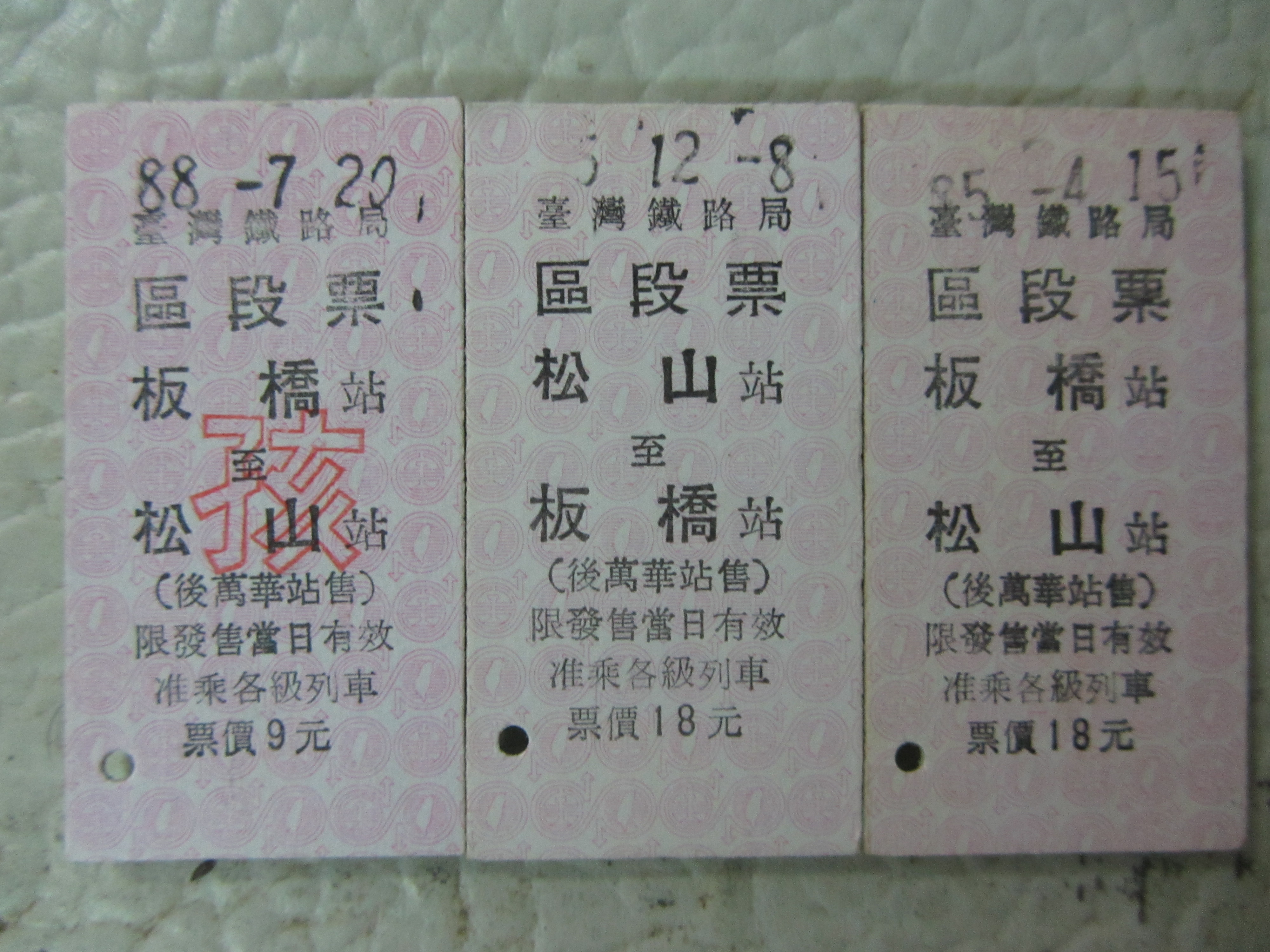 臺灣鐵路管理局板橋─松山車站間區段票名片式車票